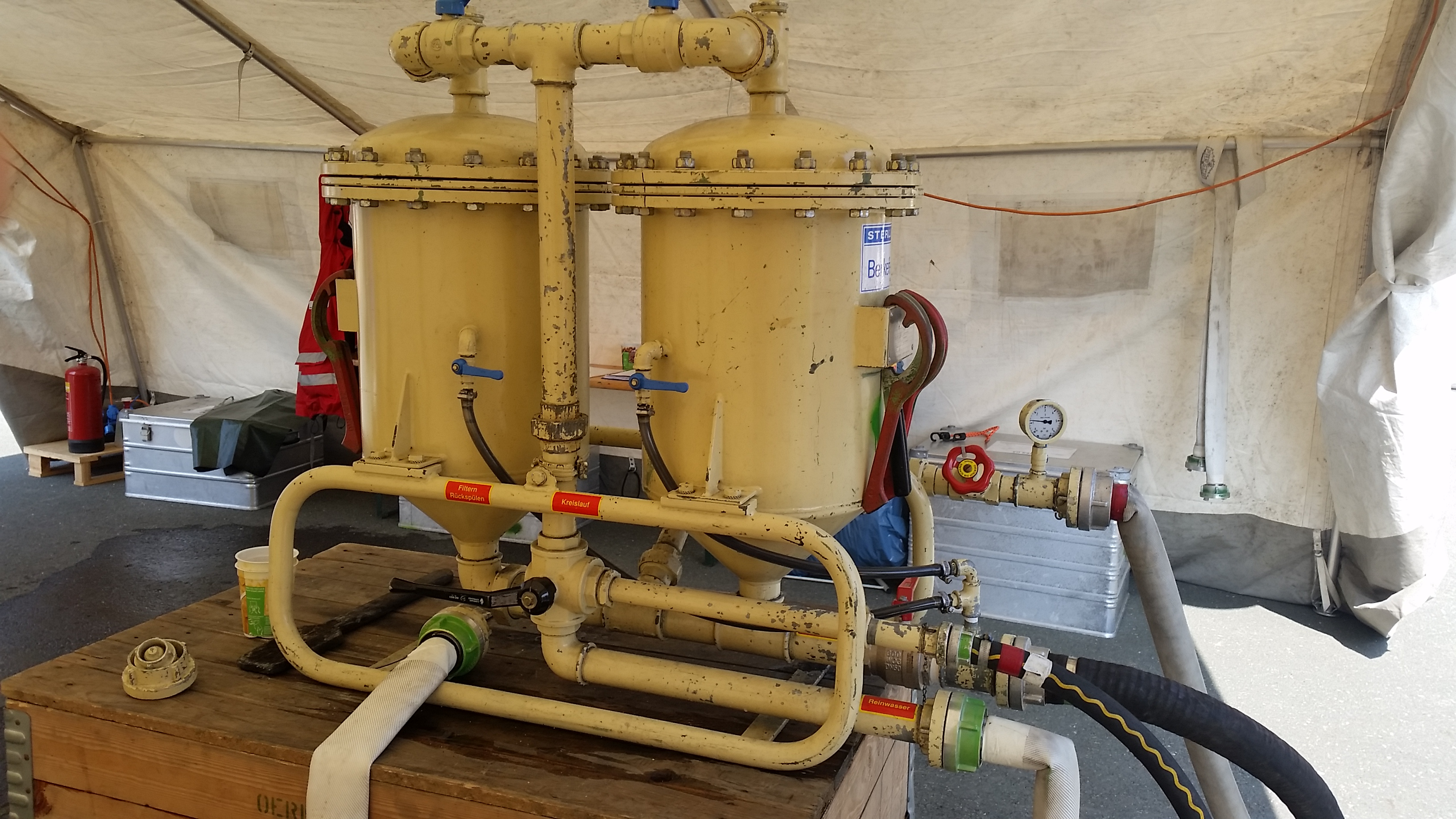 Berkefeld-Filter mit einer Leistung von 6m³/h.